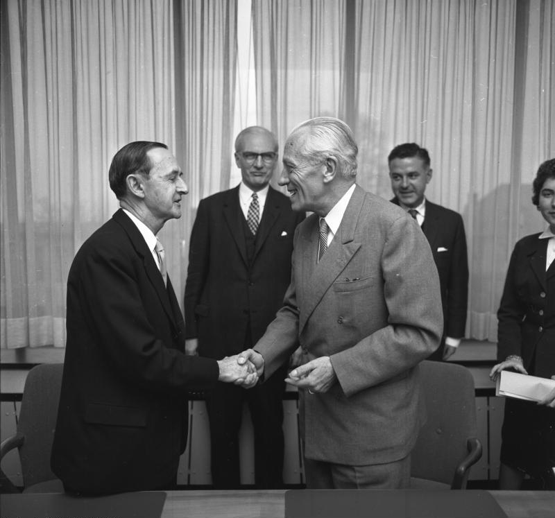 3. Protokoll (Unterzeichnung) zum deutsch-australischen Handelsvertrag